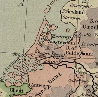 Holland 1477